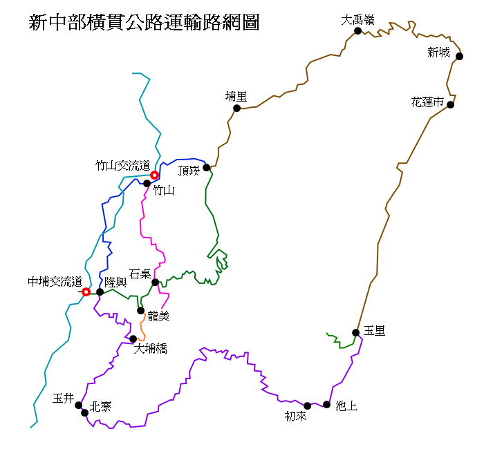 新中部橫貫公路運輸路網圖。